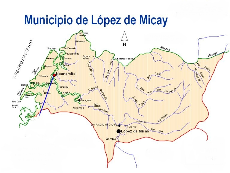 Mapa Político Municipio de López de Micay